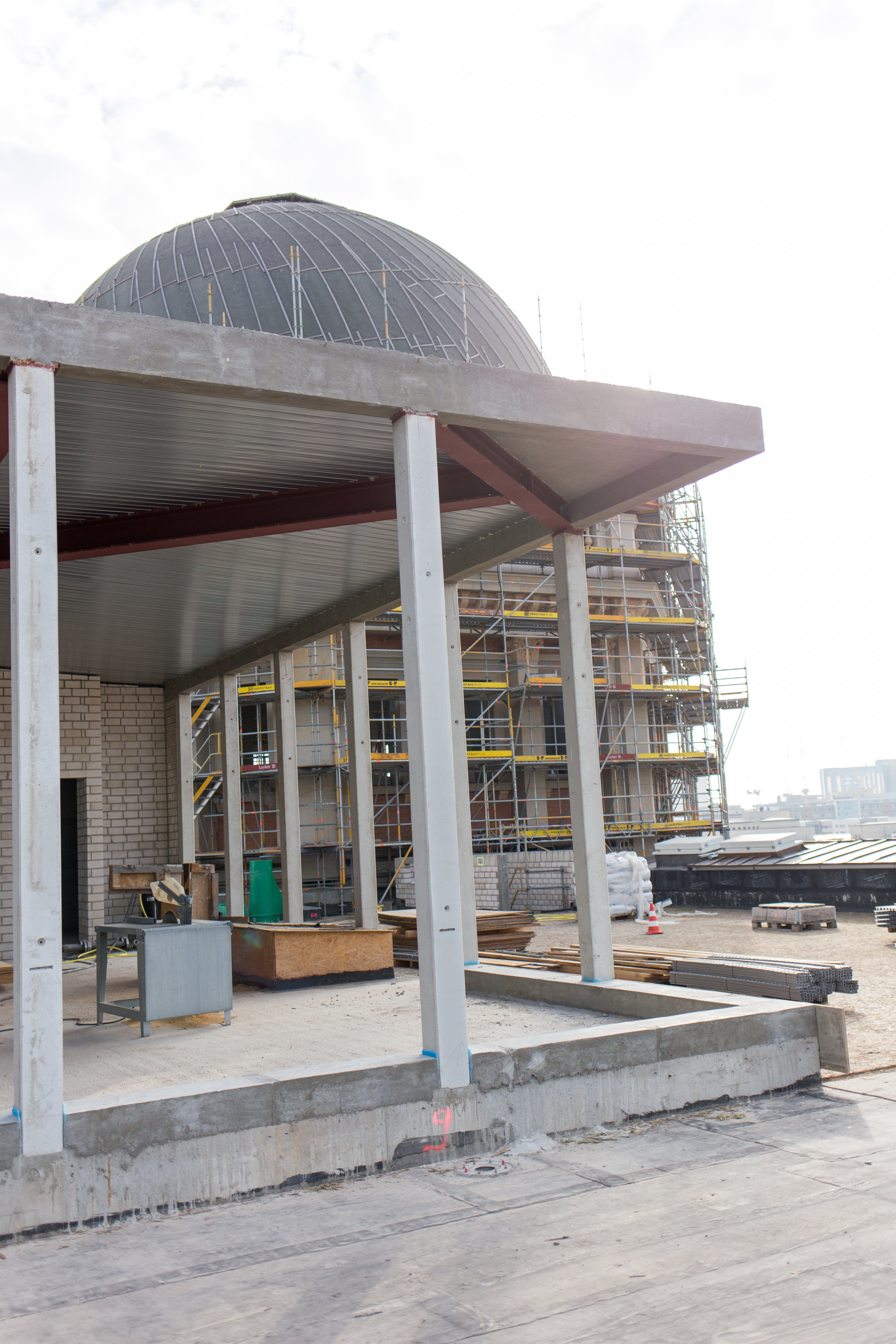 Wikipedia KulTour im Humboldt Forum